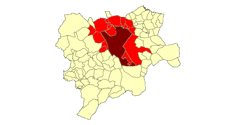 Área de influencia de Albacete capital